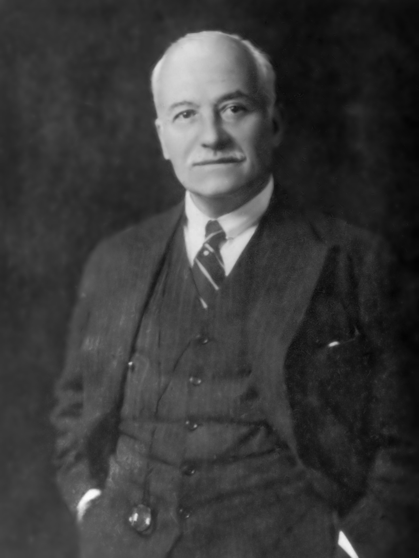 Henri Wilhelm August Deterding (1866-1939) was directeur-generaal van de Koninklijke Nederlandse Petroleum Maatschappij en directeur-generaal van het Koninklijke Shell Concern.